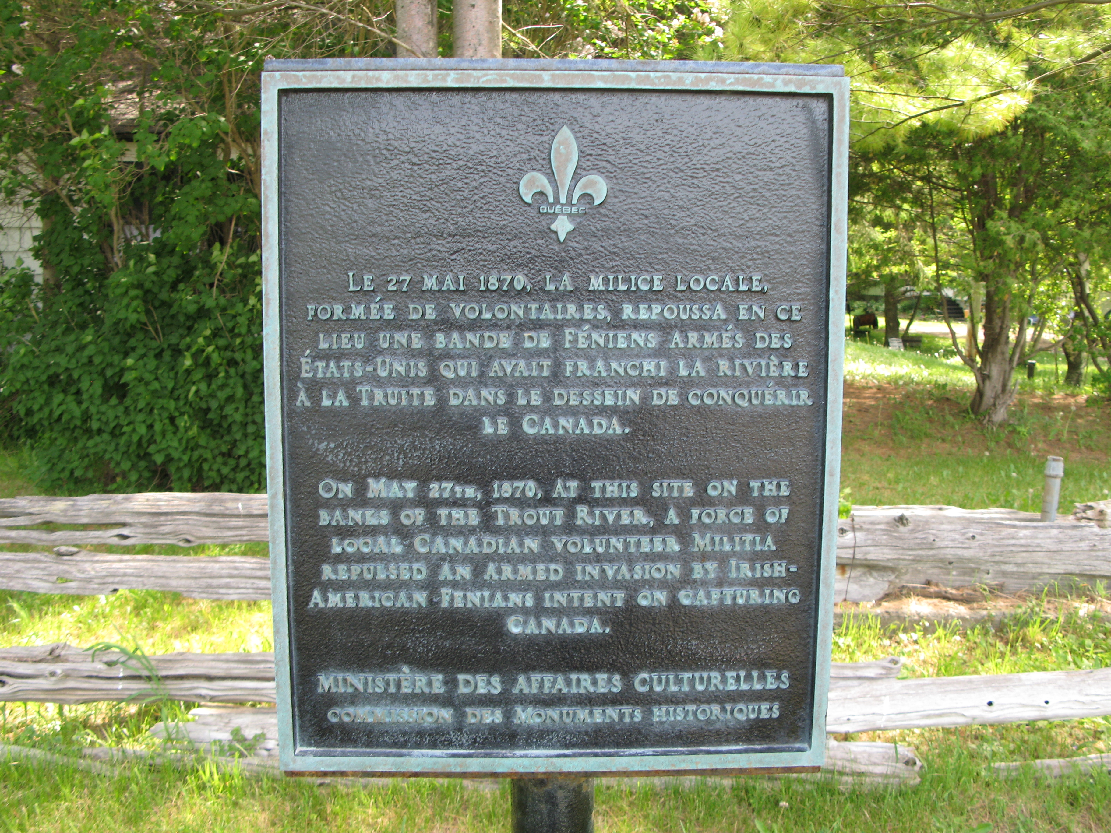 Photographie de la plaque historique dans le hameau de Trout-River